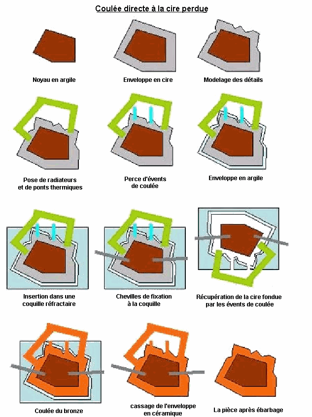 Etapes du procédé de coulée directe à la cire perdue